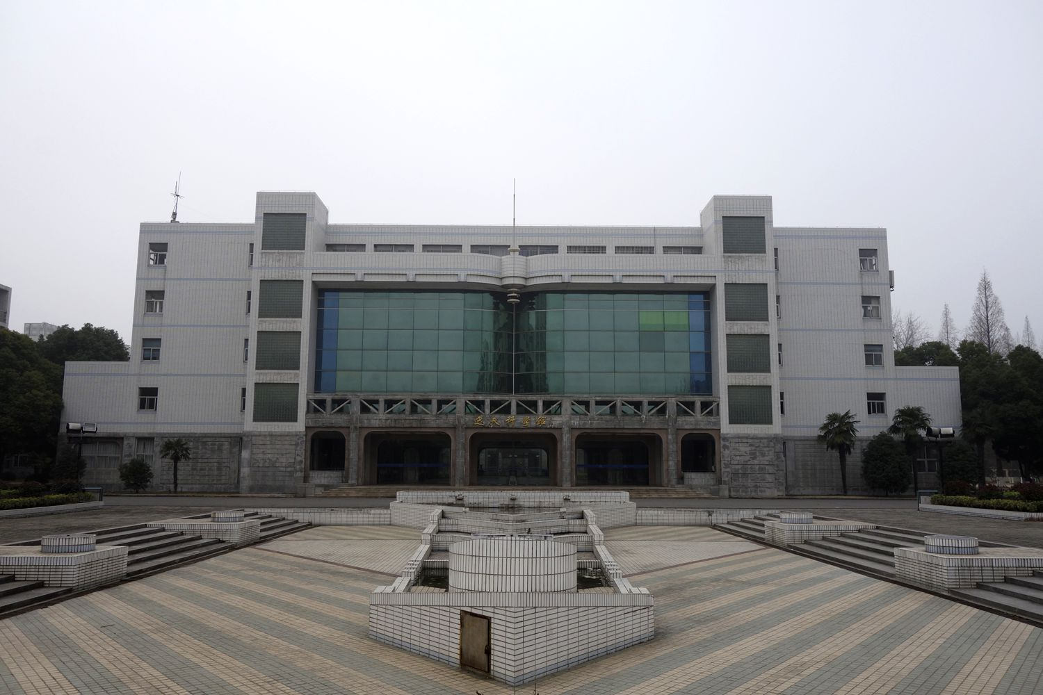 中文（中国大陆）: 南京航空航天大学 标营校区 逸夫科学馆